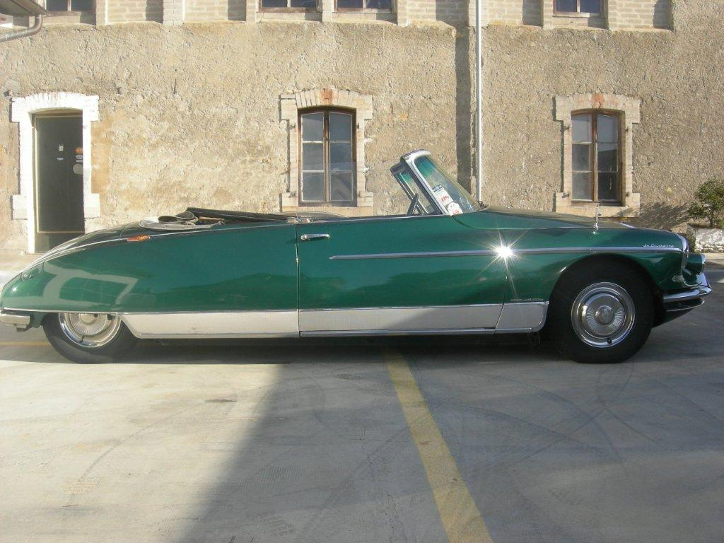 DS 19 croisette de 1961